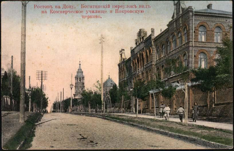 Ростов-на-Дону до Октябрьской революции. Коммерческое училище (цветное изображение).